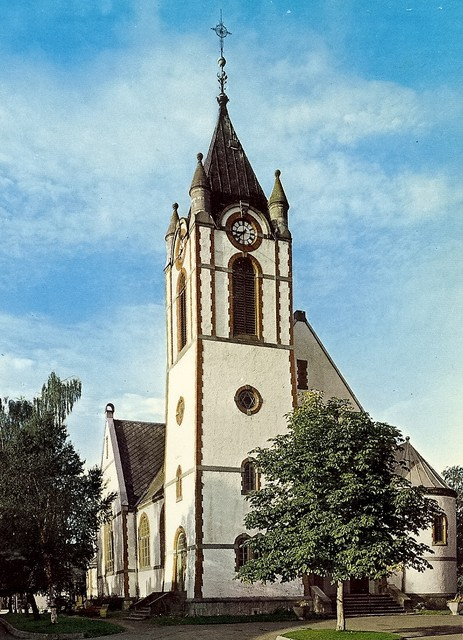 Levanger kirke